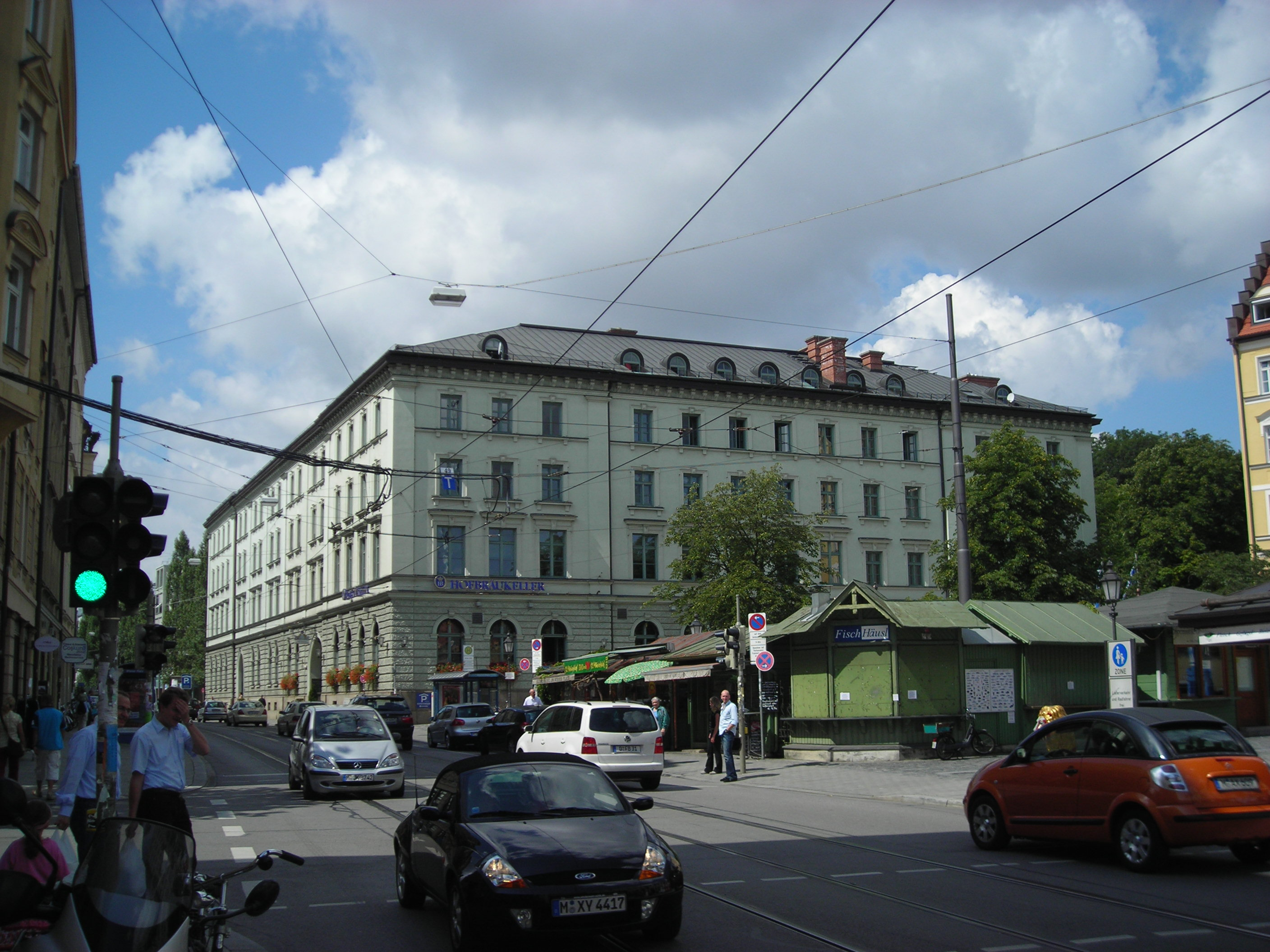 Hofbräukeller mit einem Teil des Wiener Marktes